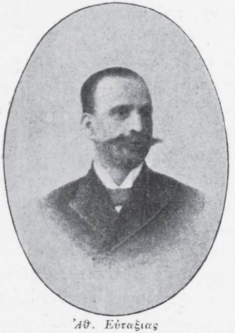 griechischer Regierungspolitiker, 1896